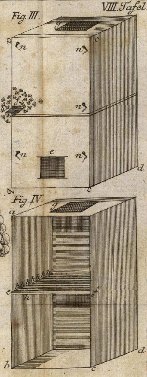 Colmena vertical de paneles móviles